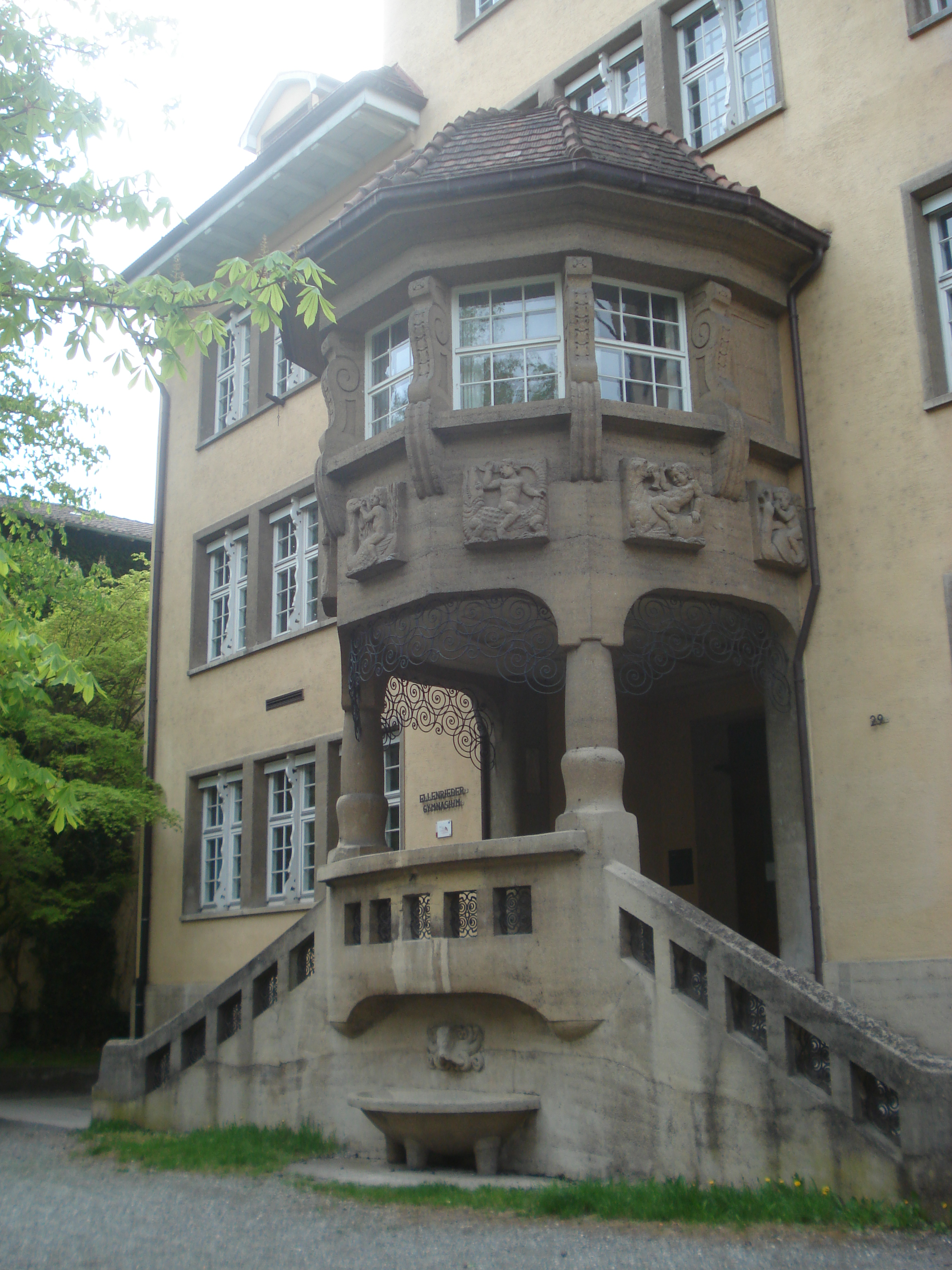 Haupteingang Brauneggerstraße, Jugendstil 1910